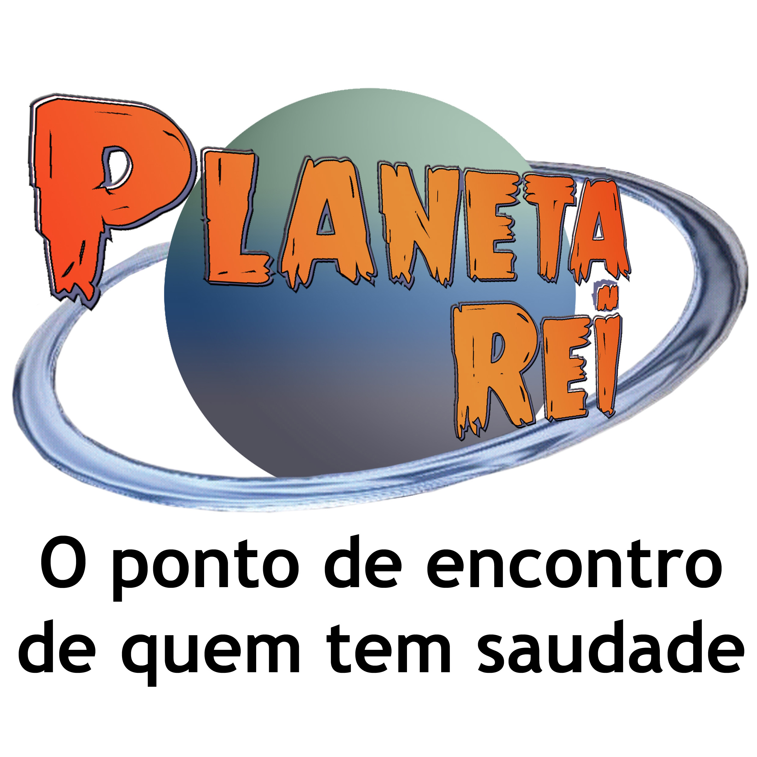 Logo do Planeta Rei